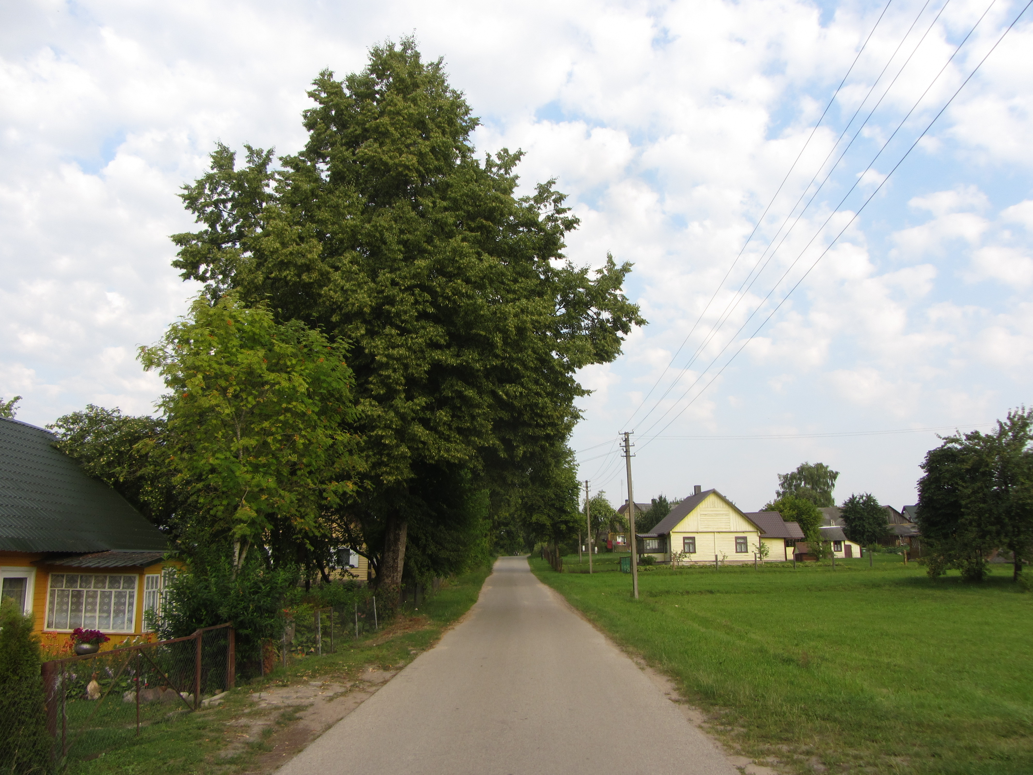 Kibyšiai, Lithuania